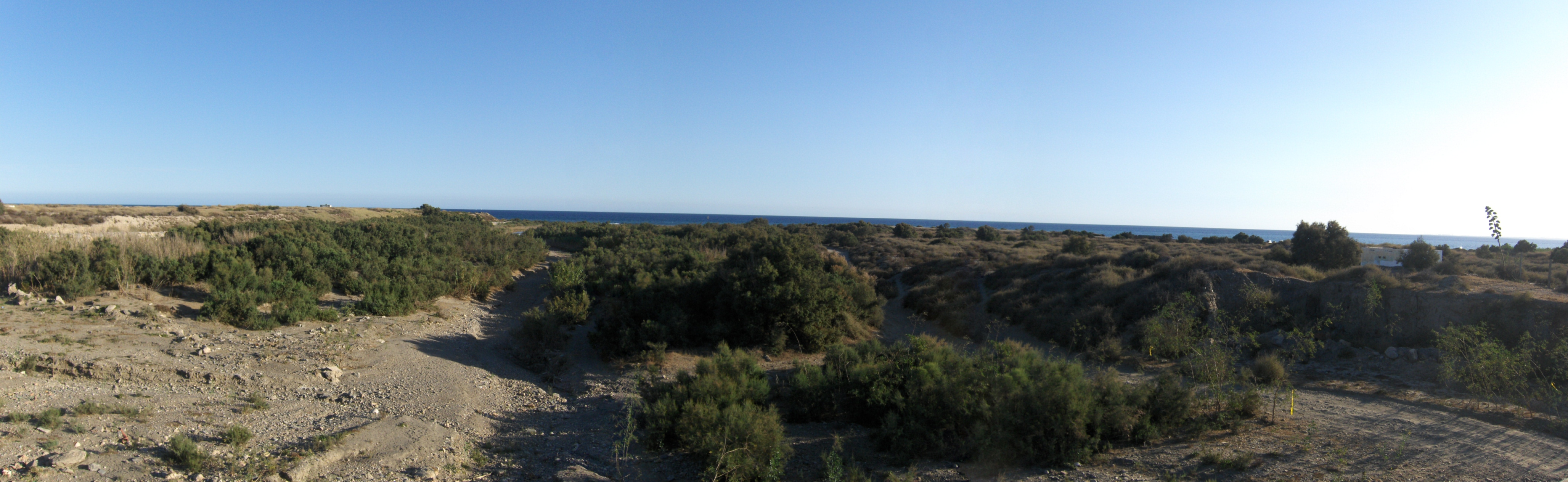 Desembocadura del Río Andarax, en Almería